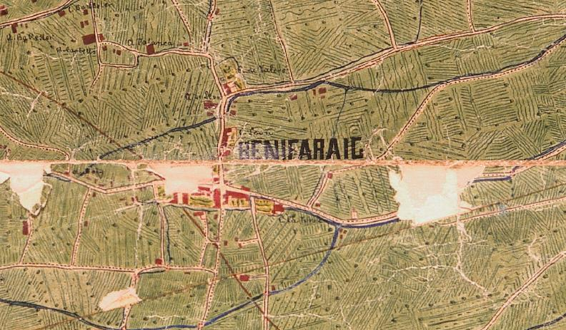 Benifaraig el 1883 (el nord està a la dreta).